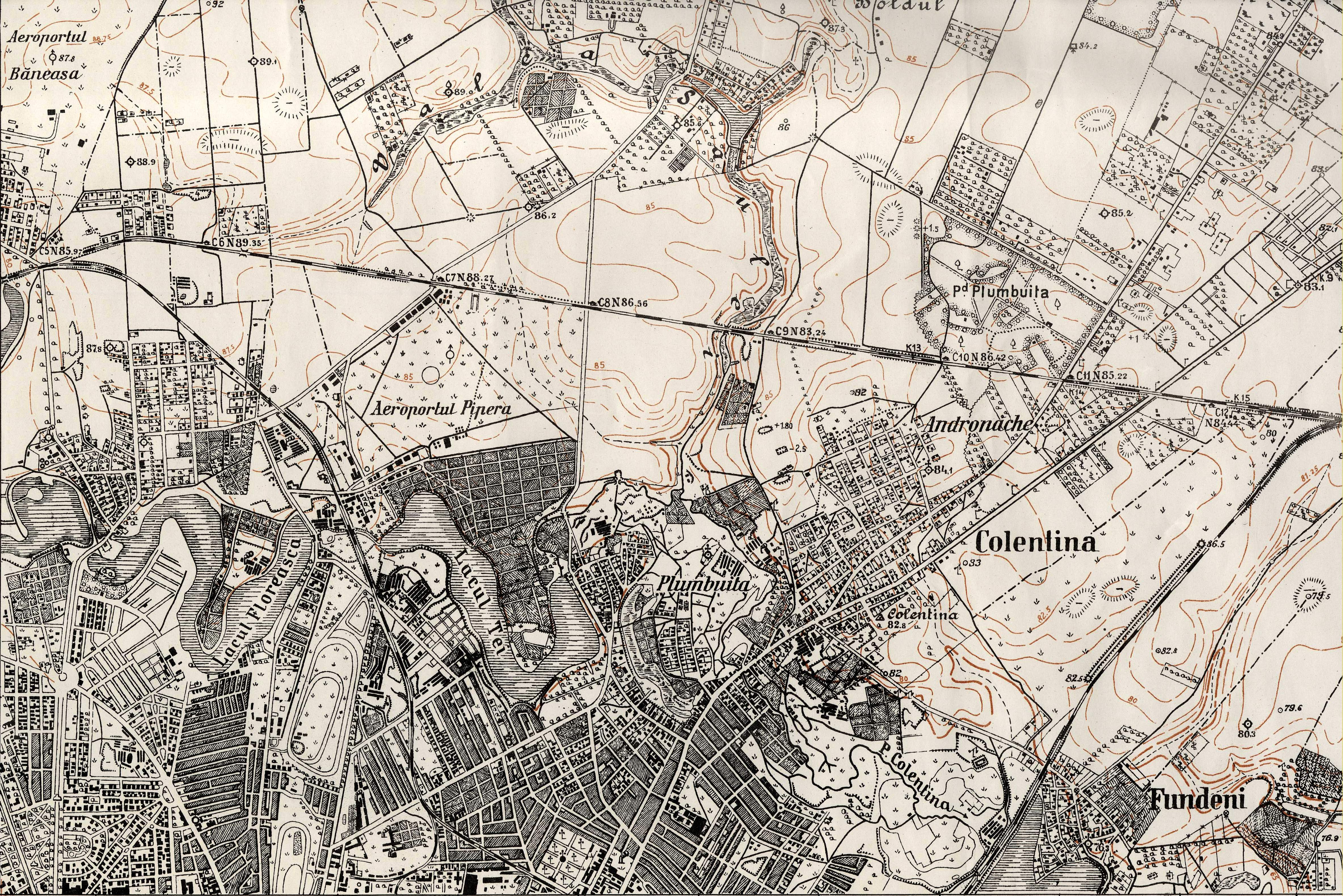 Vechi plan a zonei de nord-est a Bucureştiului, precum şi a comunelor din vecinătatea sa: Colentina şi Fundeni.